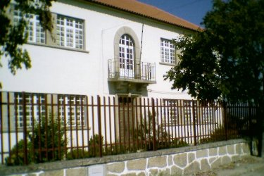 EB1 Alcains - Edifício 2